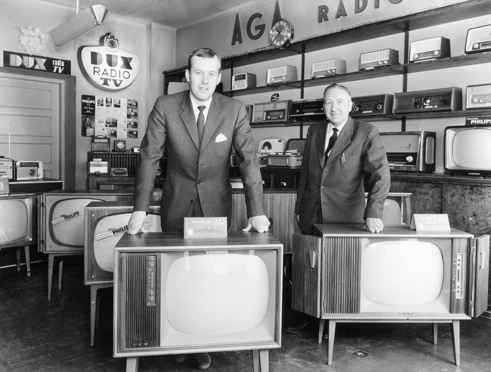 Källmans Radio & Tv i Örnsköldsvik. Från vänster ägaren Uno Källman och försäljaren Olle Wiberg.